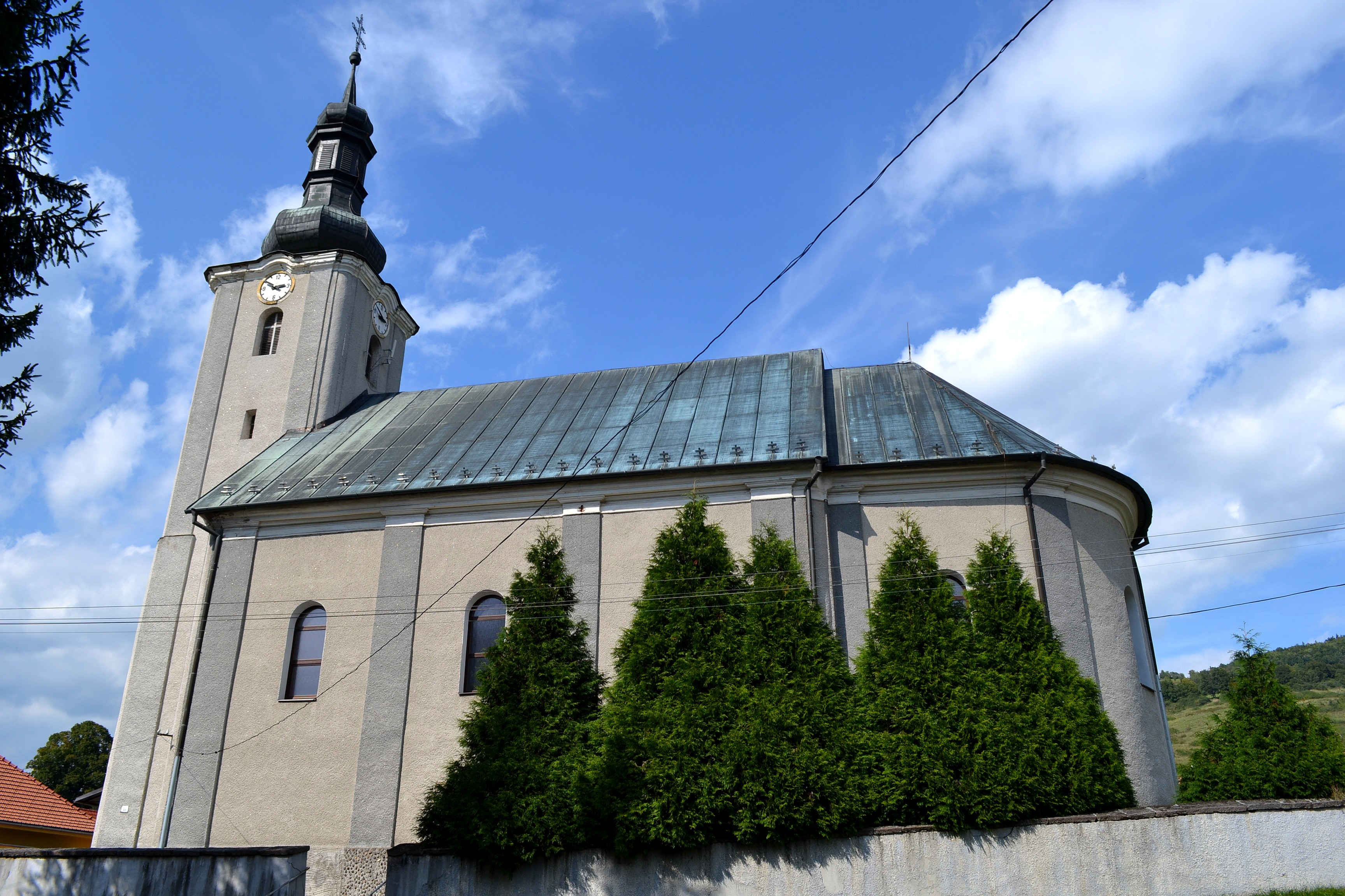 Kostol svätého Martina; celkový pohľad